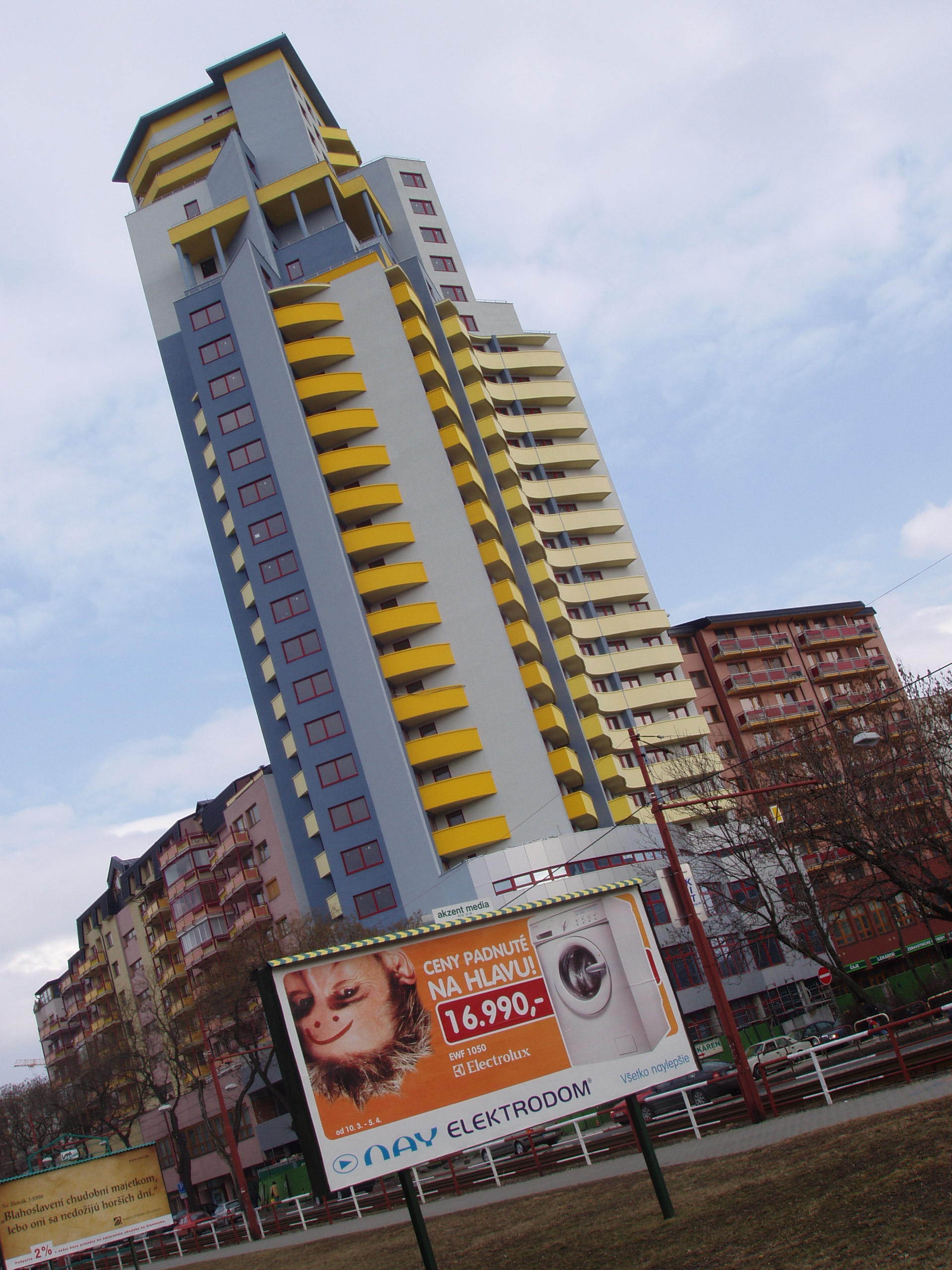 Polyfunkčný dom Glória